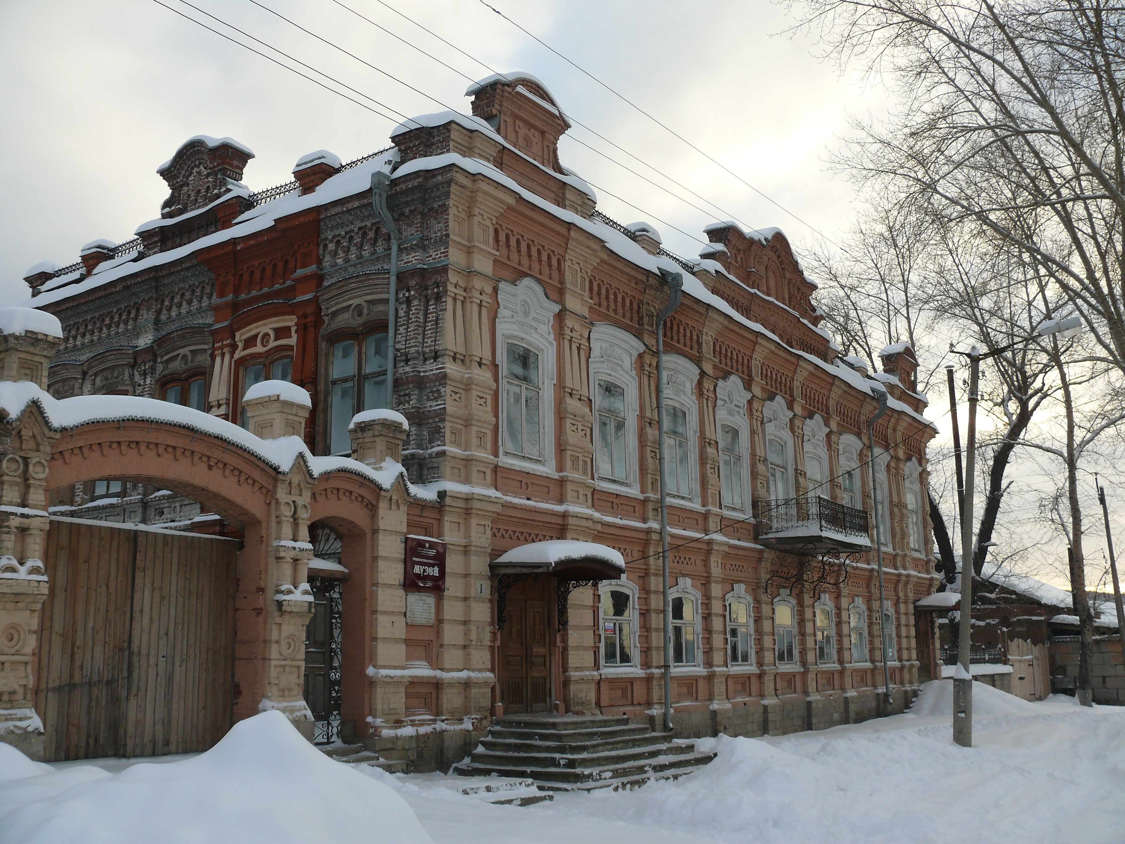 Краеведческий музей города Миасса, Симоновский особняк